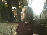 Accademico, filosofo e saggista italiano